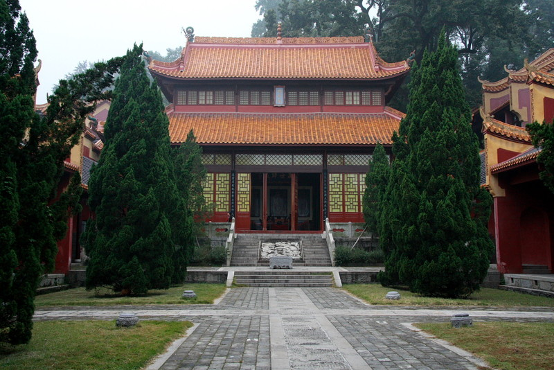 中文（中国大陆）: 文庙